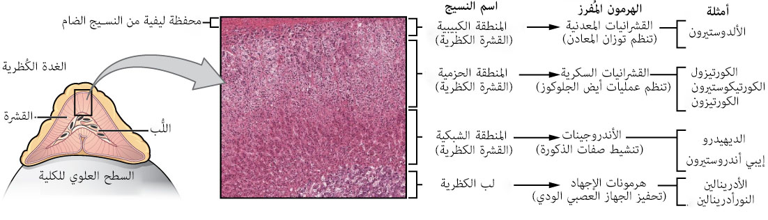 تتموضع الغدة الكظرية فوق الكلية، وتتكون من قشرة خارجية ولب داخي، وكلا الجزئين محاطان بمحفظة ليفية من النسيج الضام. تنقسم القشرة إلى ثلاث مناطق، وكل منطقة تفرز نوعًا مختلفًا من الهرمونات. تبلغ قوة التكبير للمجهر الضوئي المستخدم × 204.